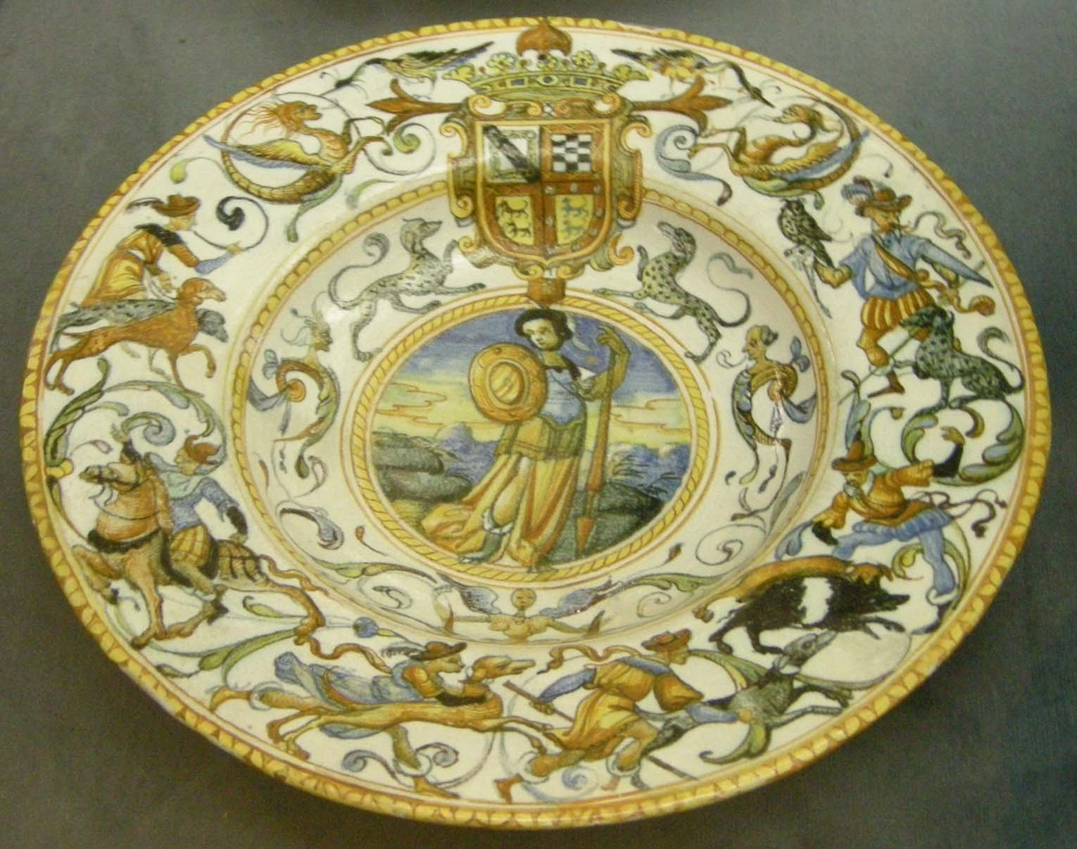 Urbino, bottega patanazzi, piatto con stemma del vicerè di napoli zuñiga, 1593 ca